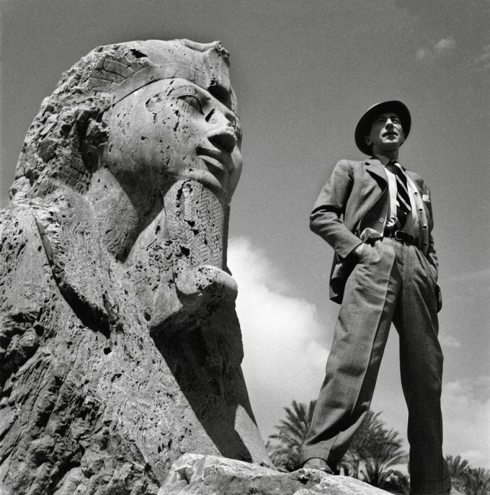 Ο Κοκτώ είναι από τις μεγαλύτερες μορφές της πνευματικής ζωής της Γαλλίας. Υπήρξε ποιητής,συγγραφέας, δραματουργός, σκηνοθέτης και ζωγράφος. Εκφραστής του σουρρεαλισμού έγραψε το σημαντικότερο ίσως βιβλίο του «Τα τρομερά παιδιά» σε μια εβδομάδα. Επηρεάστηκε πολύ από την γνωριμία του με τον Μαρσέλ Προύστ και συνδέθηκε με βαθιά φιλία με τον Γκιγιόμ Απολινέρ και τον Πικάσο.